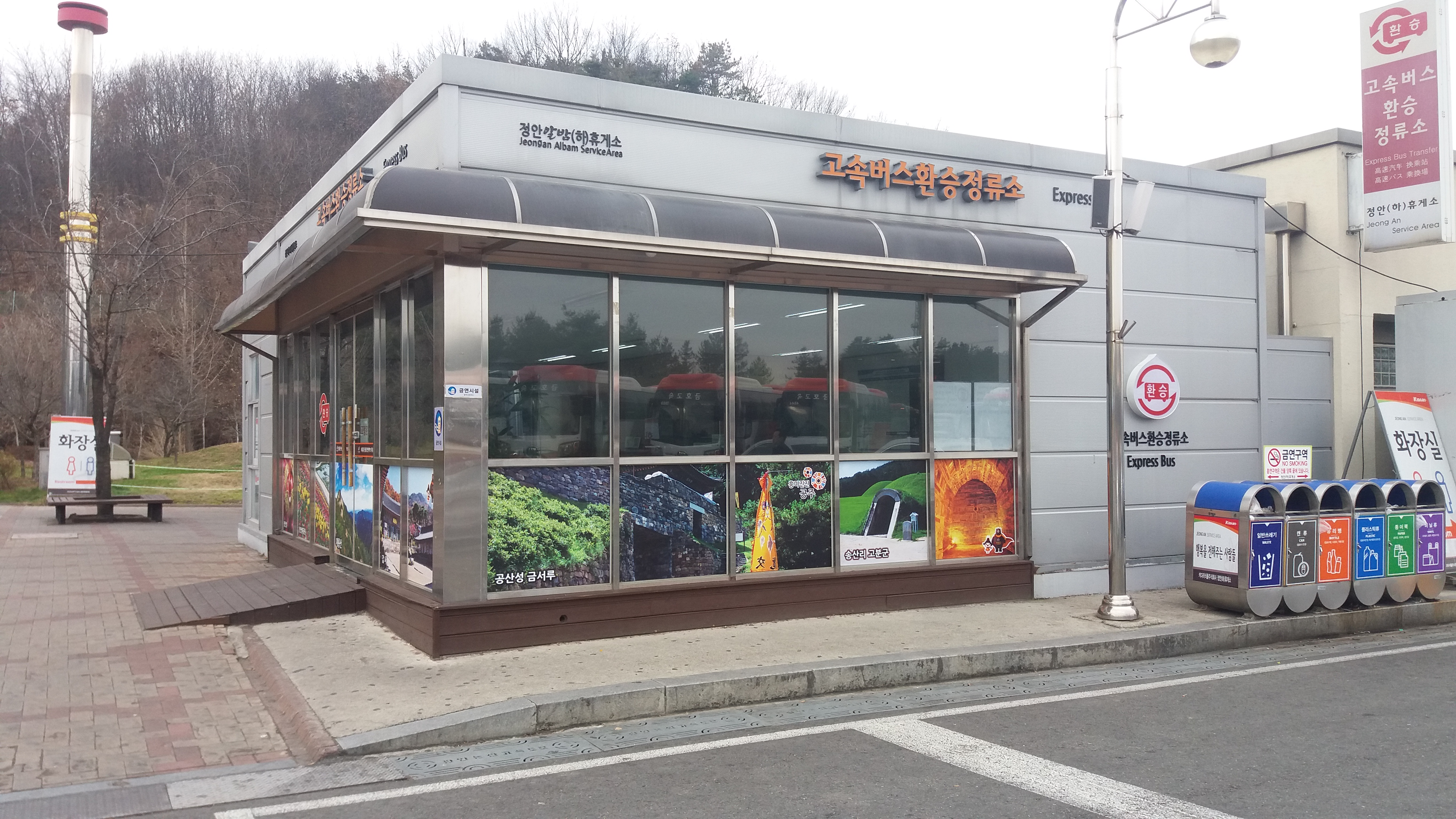 정안알밤휴게소 환승정류장